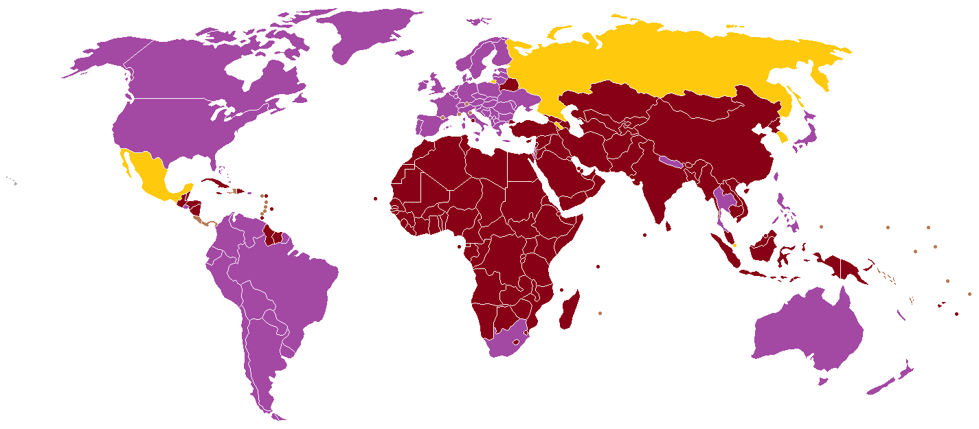 Cette carte indique le statut de l'acceptation militaire de l'homosexualité dans le monde. pas d'armée interdite autorisée mais sujette à des discriminations ou des pressions autorisée